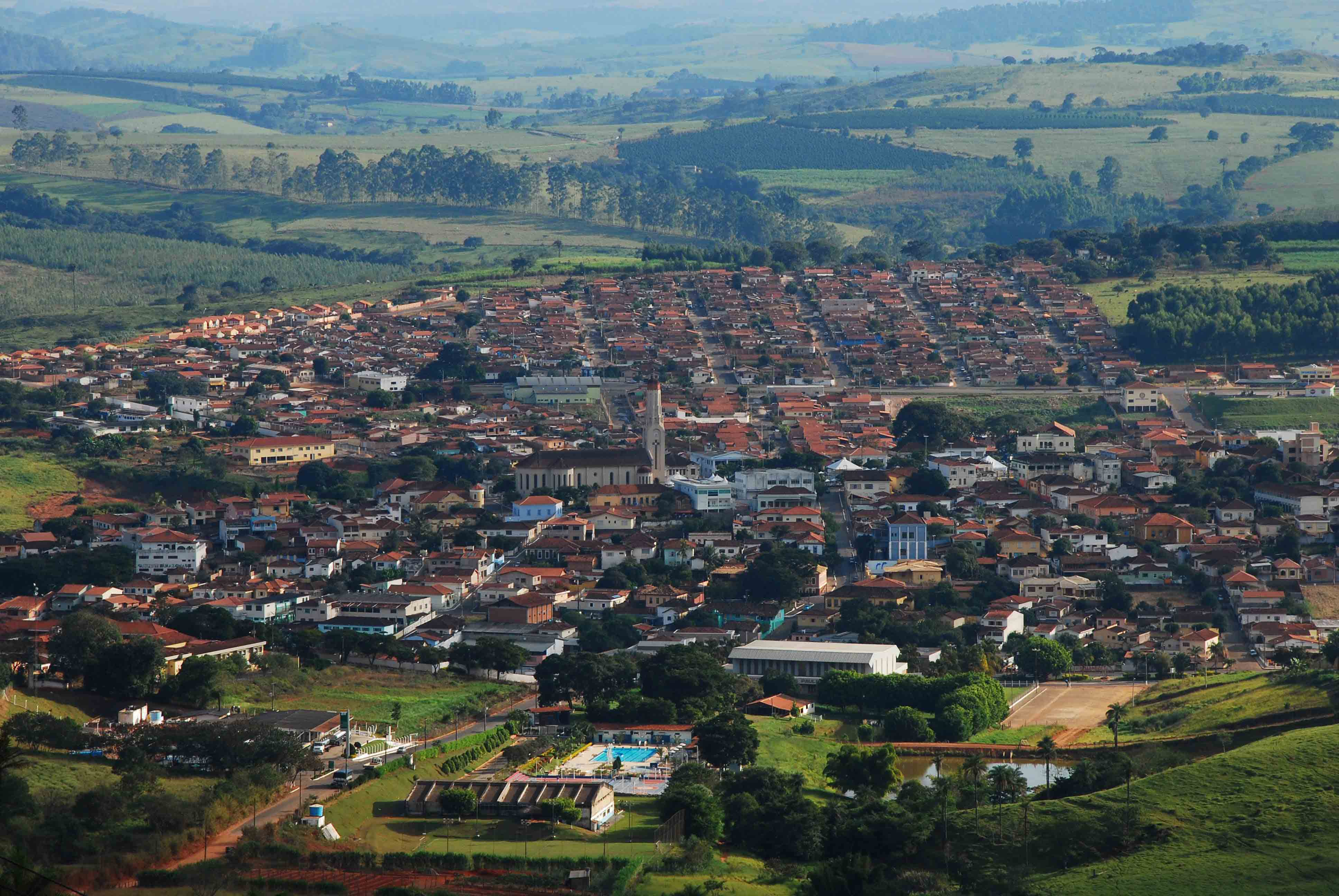 Vista da torre. Melhor se vista grande